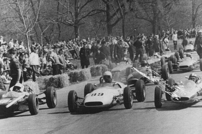 Zentralbild Gahlbeck-Studre 19.4.1964 Internationales Auto- und Motorradrennen auf der Halle-Saale-Schleife am 19.4.1964 mit Fahrer aus 17 Ländern am 18.4.1964 wurden noch eifrig Trainingsrunden auf dem Kurs absolviert. UBz. Kurz vor dem Start zum Formel 3 Rennwagen des 1000 ccm der Klasse I. Ganz links der spätere Sieger des Rennens der Franzose Jacques Bernusset auf Cooper. Daneben mit Startnummer 99 Willy Lehmann (DDR) auf Wartburg SEG. (Telebild)